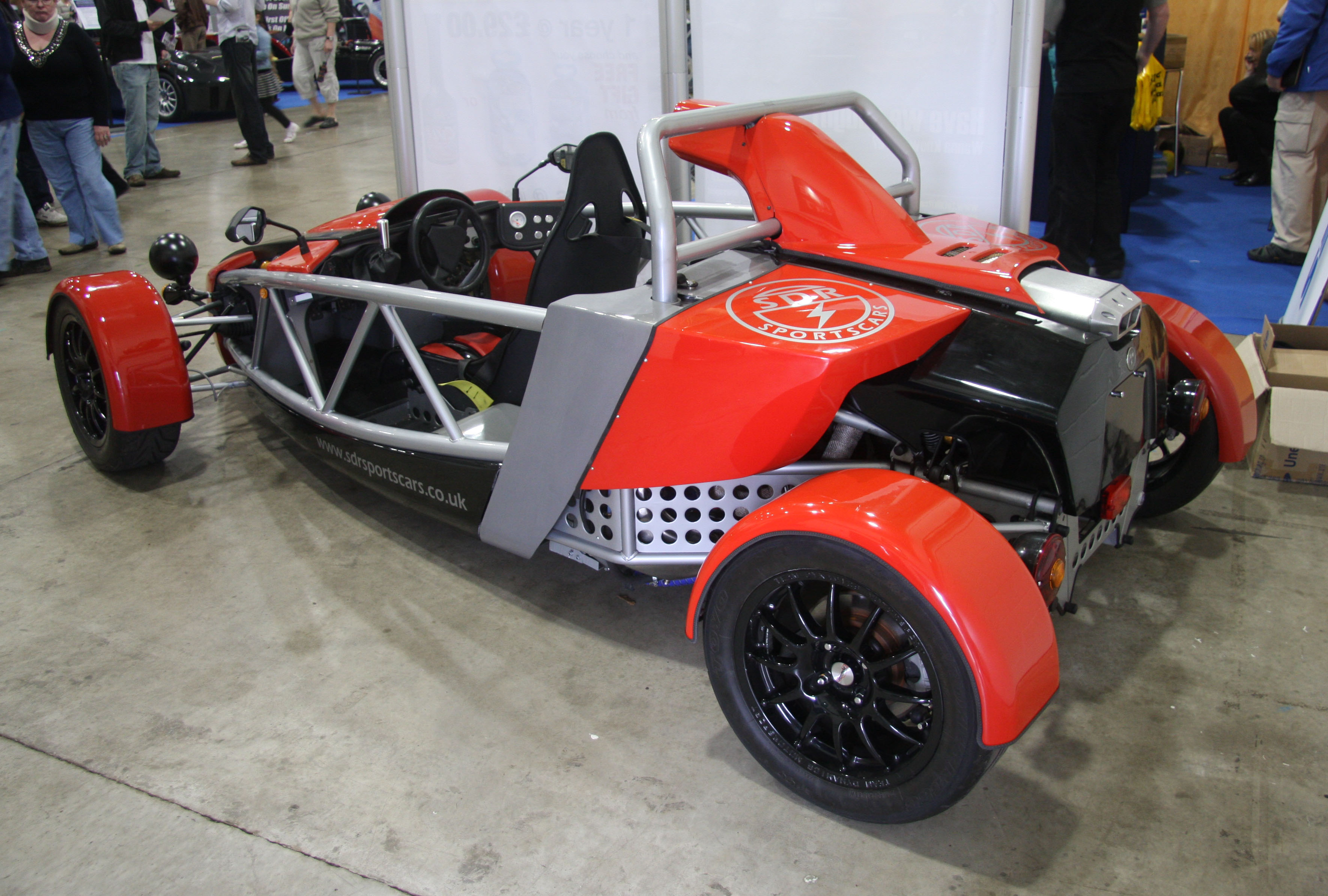 SDR V-Storm